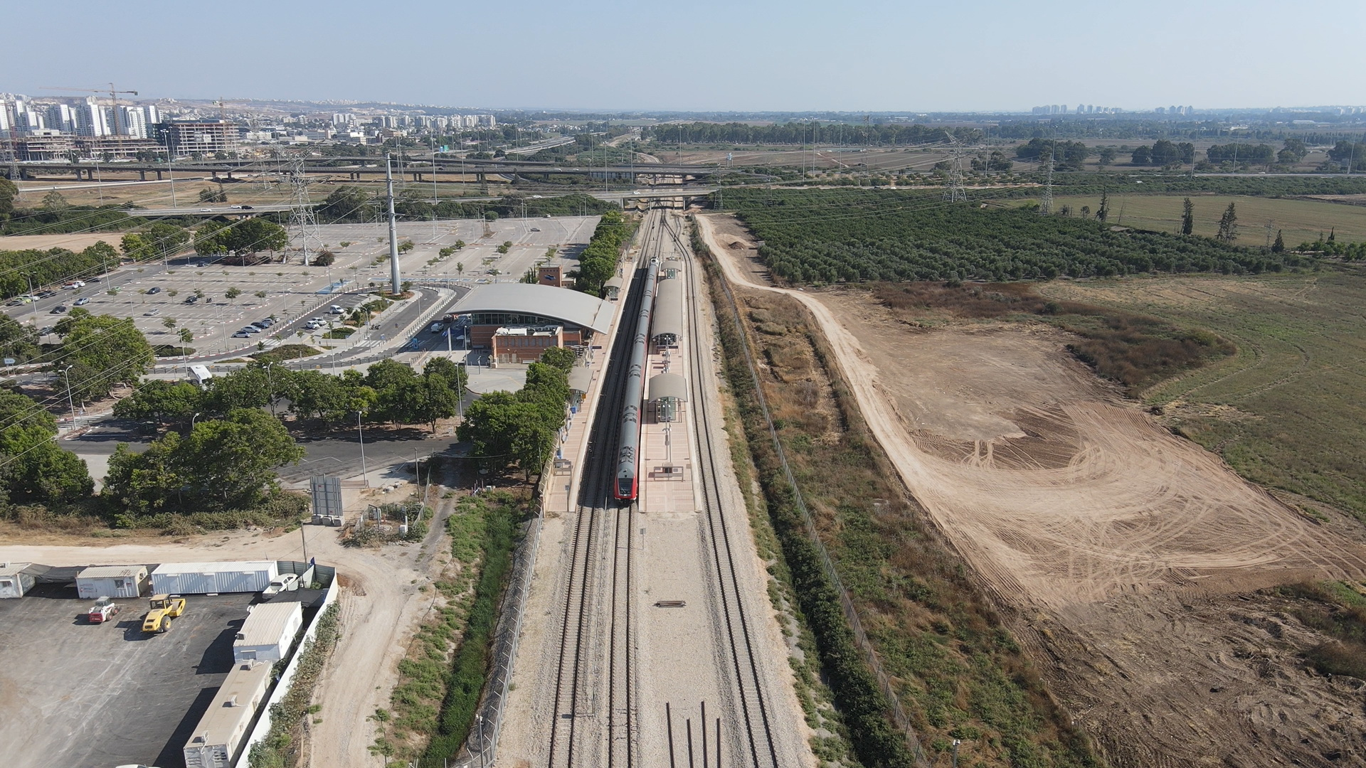 תחנת ראש העין צפון